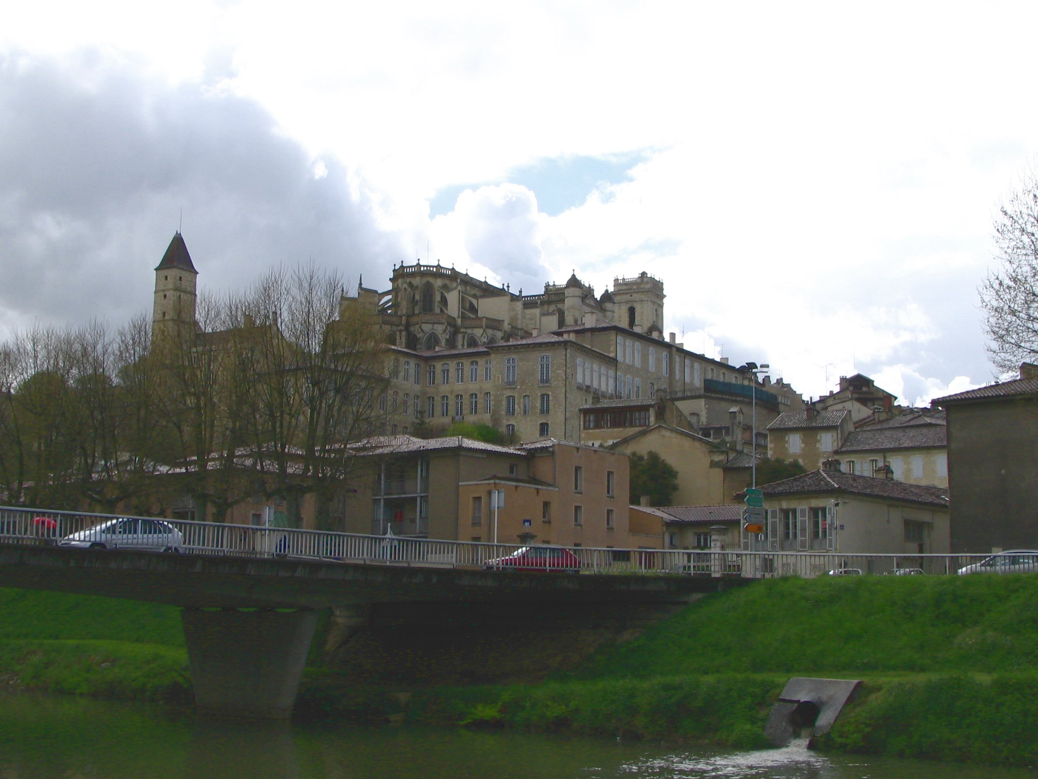 La Haute ville d'Auch (centre historique) depuis le Gers, on y voit la nef de la cathédrale Sainte-Marie en haut, et la tour d'Armagnac sur la gauche.